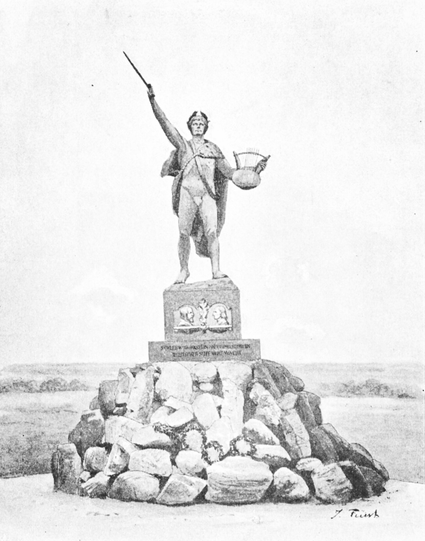 Denkmal zu Ehren von Matthäus Friedrich Chemnitz und Carl Gottlieb Bellmann, den Schöpfern von Schleswig-Holstein meerumschlungen, das an dieser Stelle am 24. Juli 1844 erstmals aufgeführt wurde, an der Schützenkoppel in Schleswig, Zeichnung von Julius Fürst.